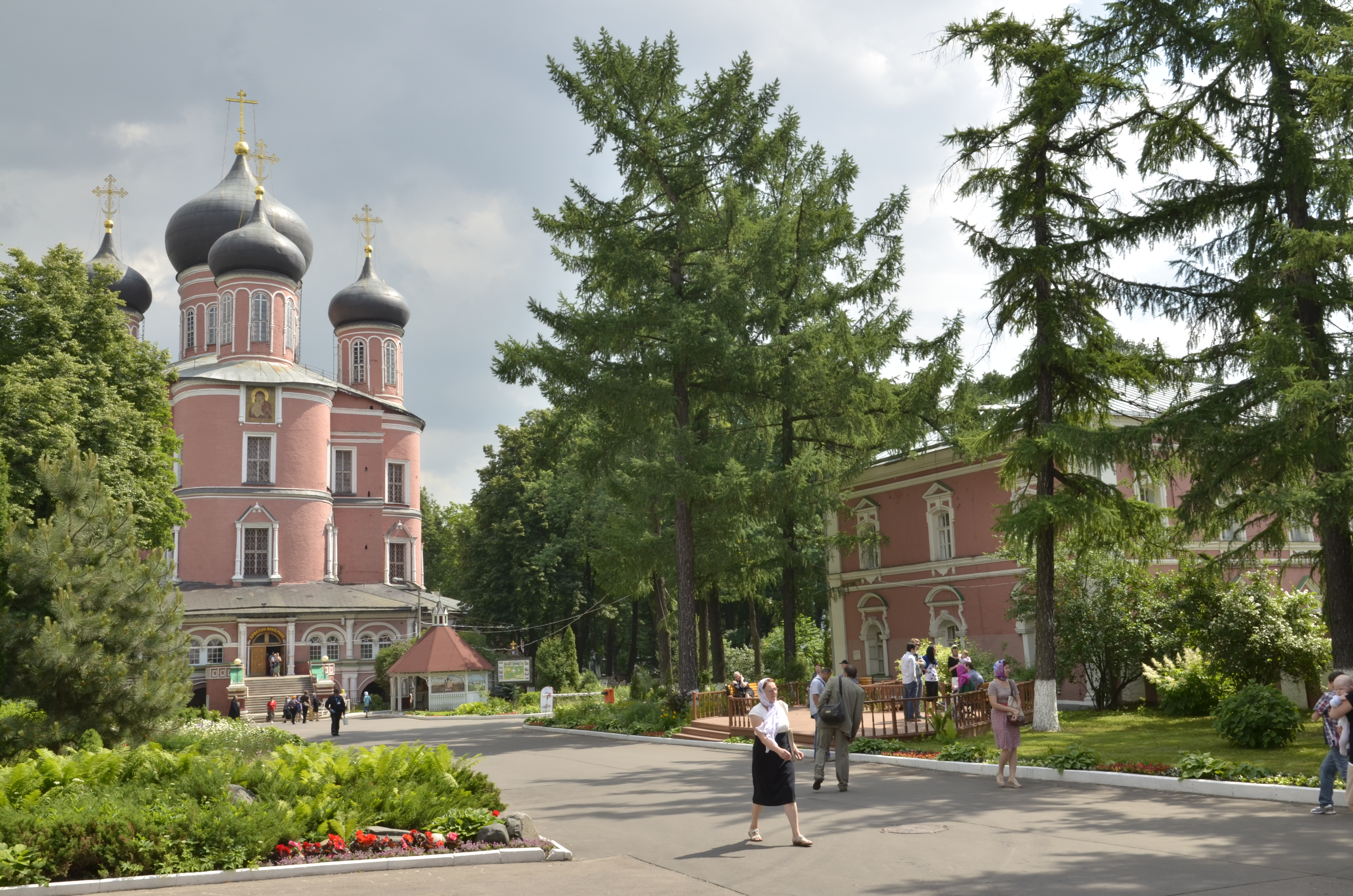 Монастырь Донской (Москва и Московская область, Москва, Донская площадь, 1)